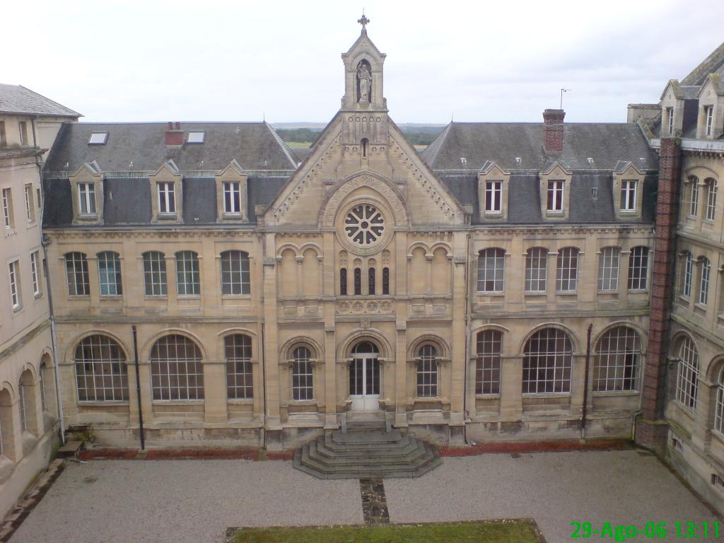 Patio de l'ancien séminaire de Villiers-le-Sec, Calvados, Basse-Normandie, France.